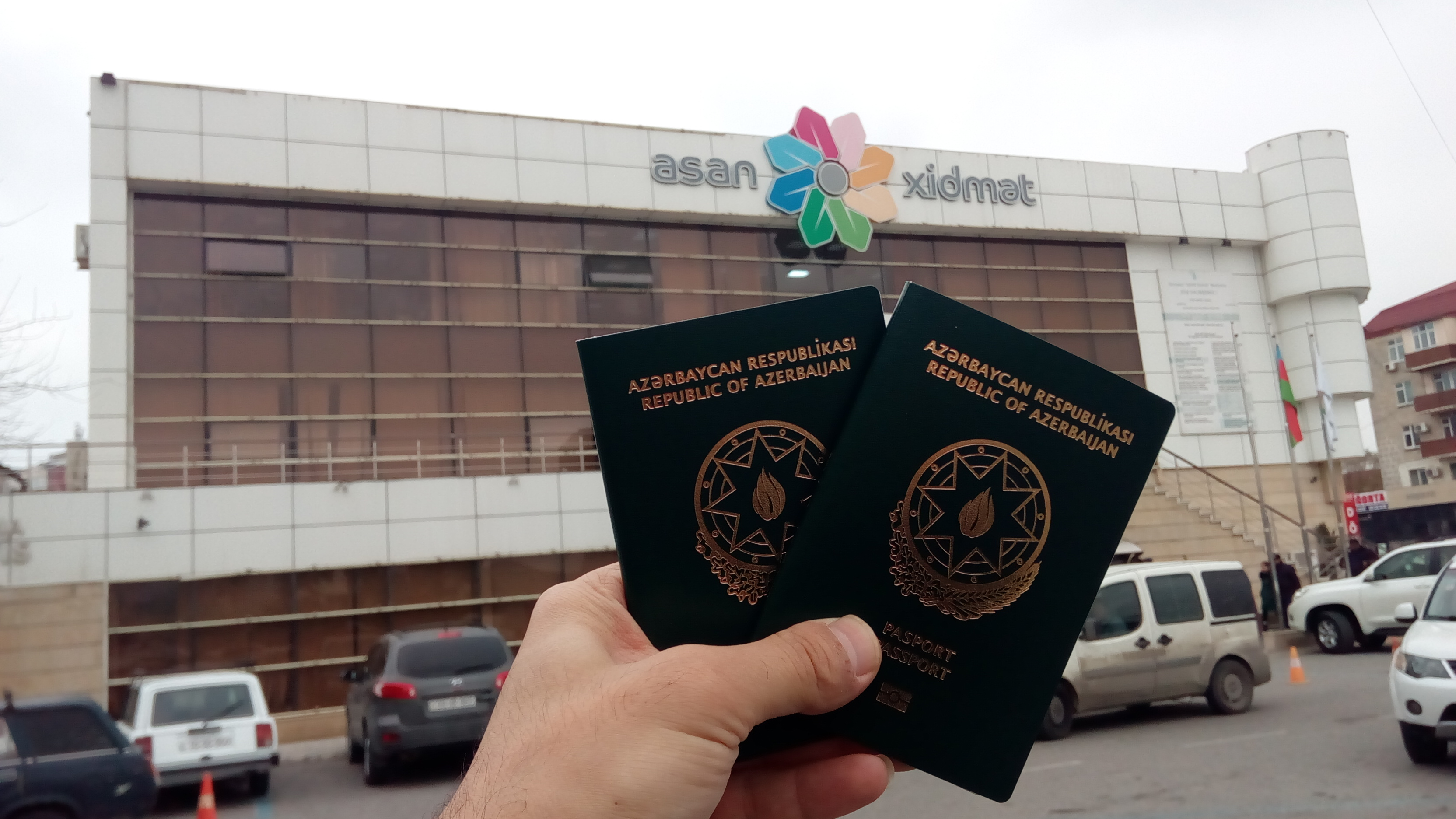 Sumqayıt ASAN Xidmətdən alınan pasportlar